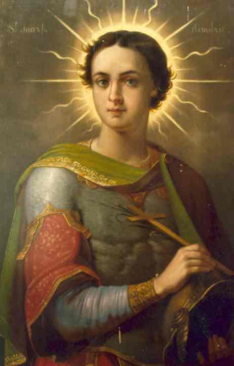 Gheorghe Tattarescu - Sfântul Dumitru, Muzeul Municipiului Bucureşti, 76x50,2 cm.